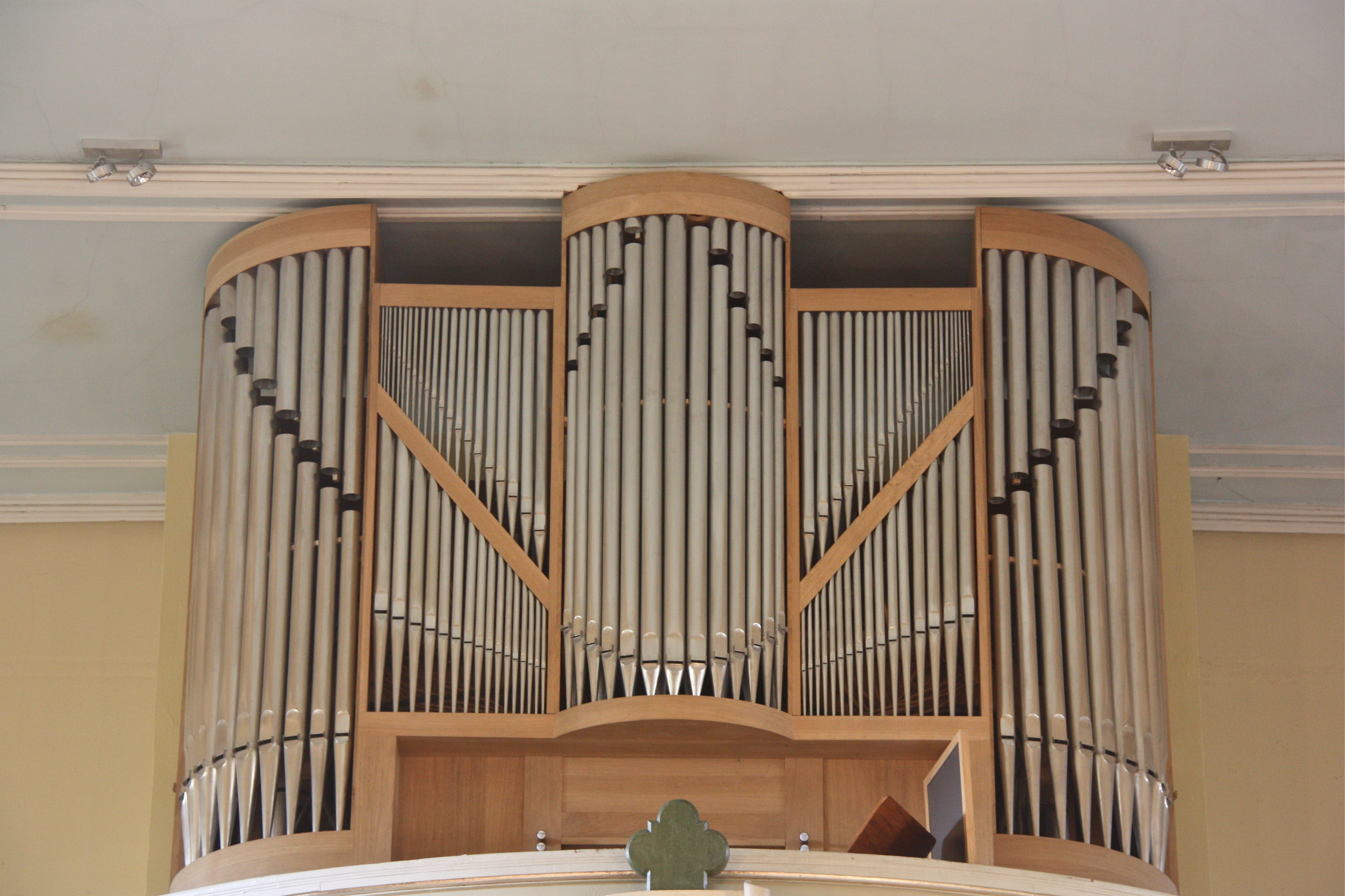 Hamburg, Kirche St. Pauli, Altona-Altstadt, Innenraum, Orgel, Bartelt Immer 2011